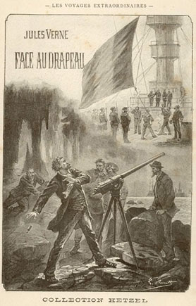 Ilustrace Léona Benetta k románu J. Verna